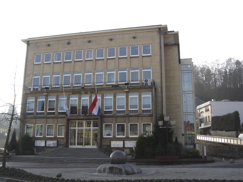 Déifferdenger Gemengenhaus